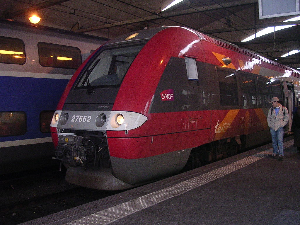 Gare de Nîmes - Croisement d'un TGV et d'un TER (AGC) avec la livrée aux couleurs de la Région Languedoc-Roussillon